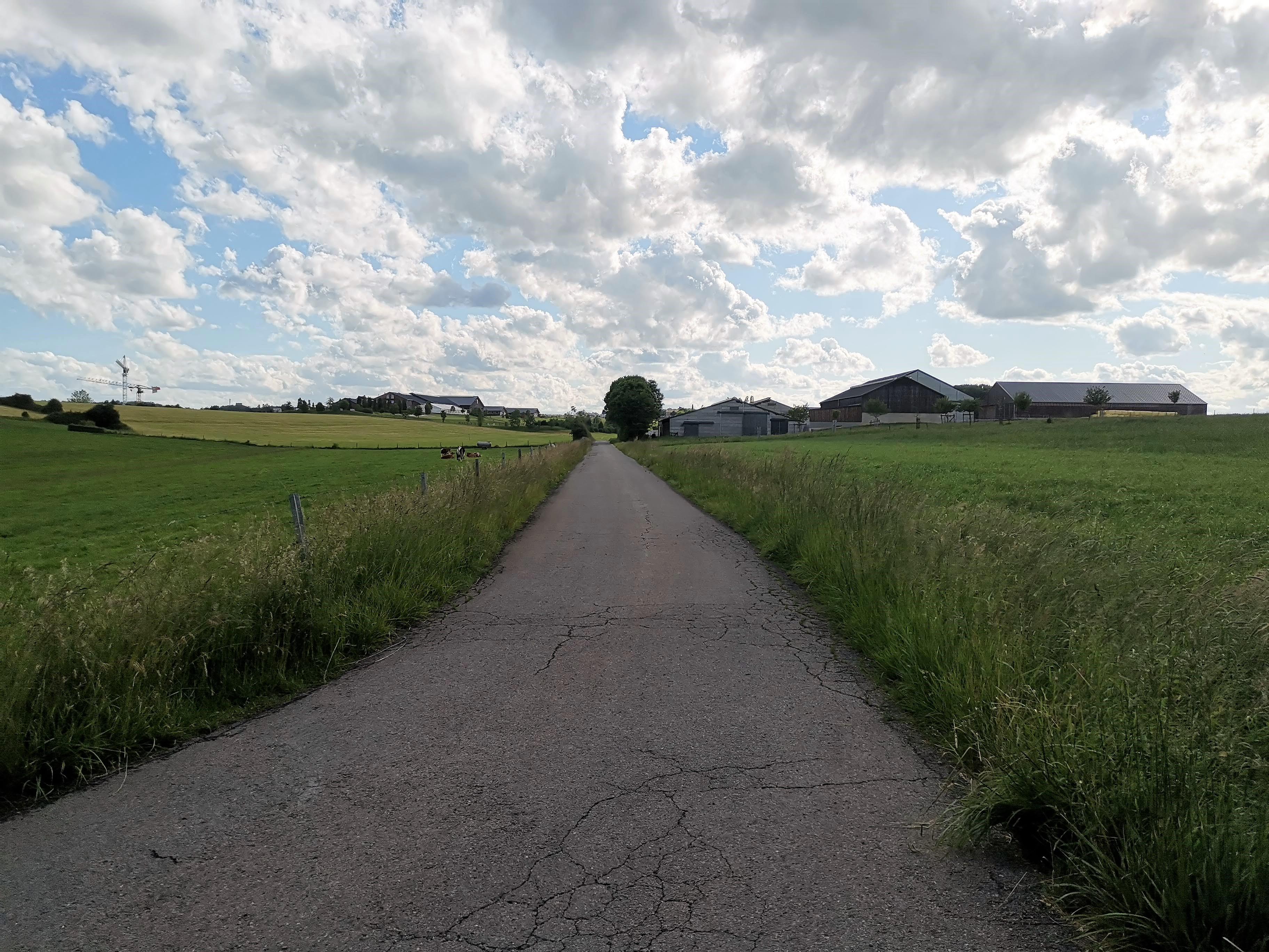 Sur l'itinéraire cyclable du Faubourg minier (PC9) à Leudelange.